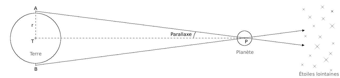 Description : Parallaxe diurne. Source : Dhenry ; schéma personnel. Licence